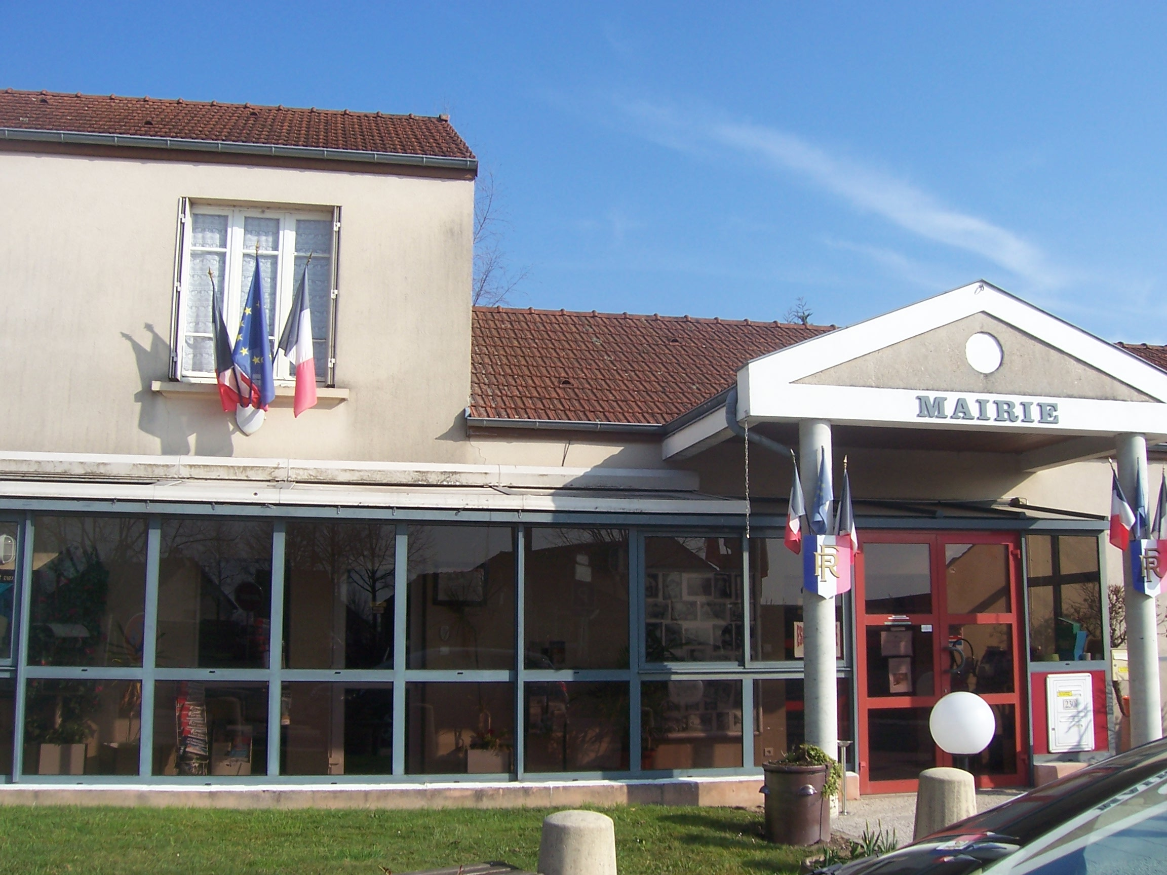 Mairie des Bizots